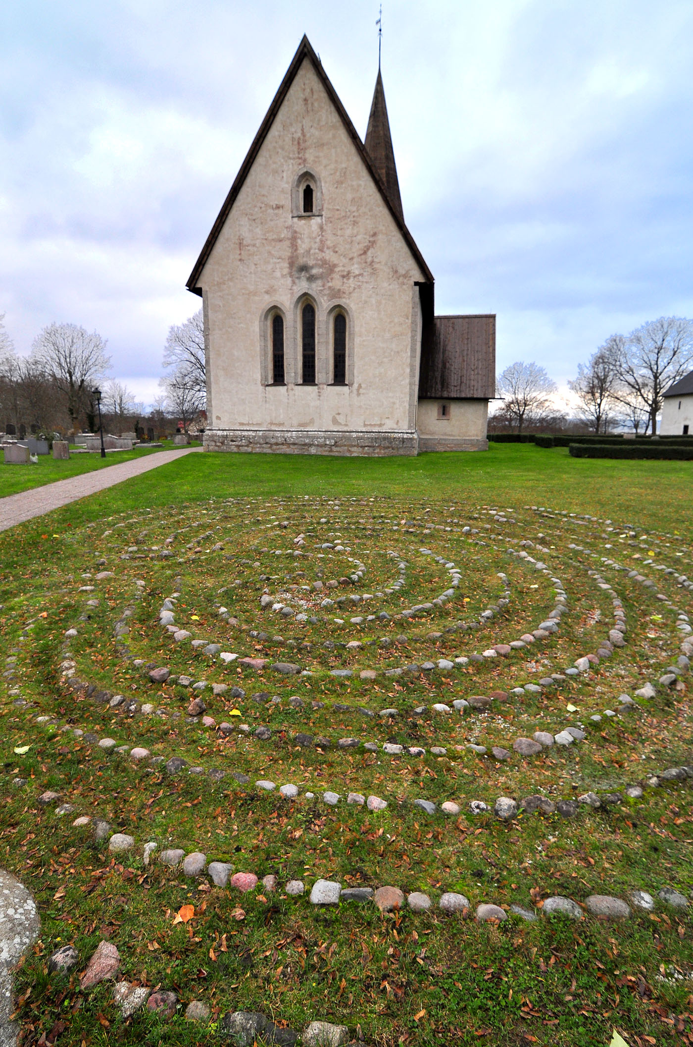 Labyrint på Fröjel kyrkogård, Gotland.